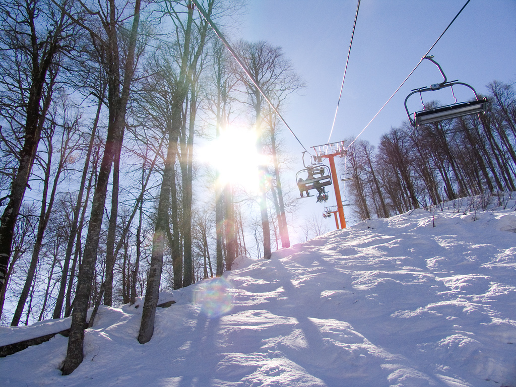 off-pist in Krasnaya_Polyana